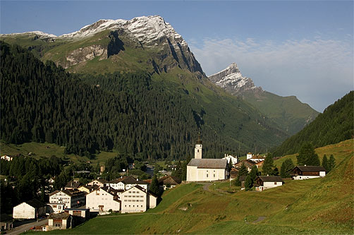 Splügen